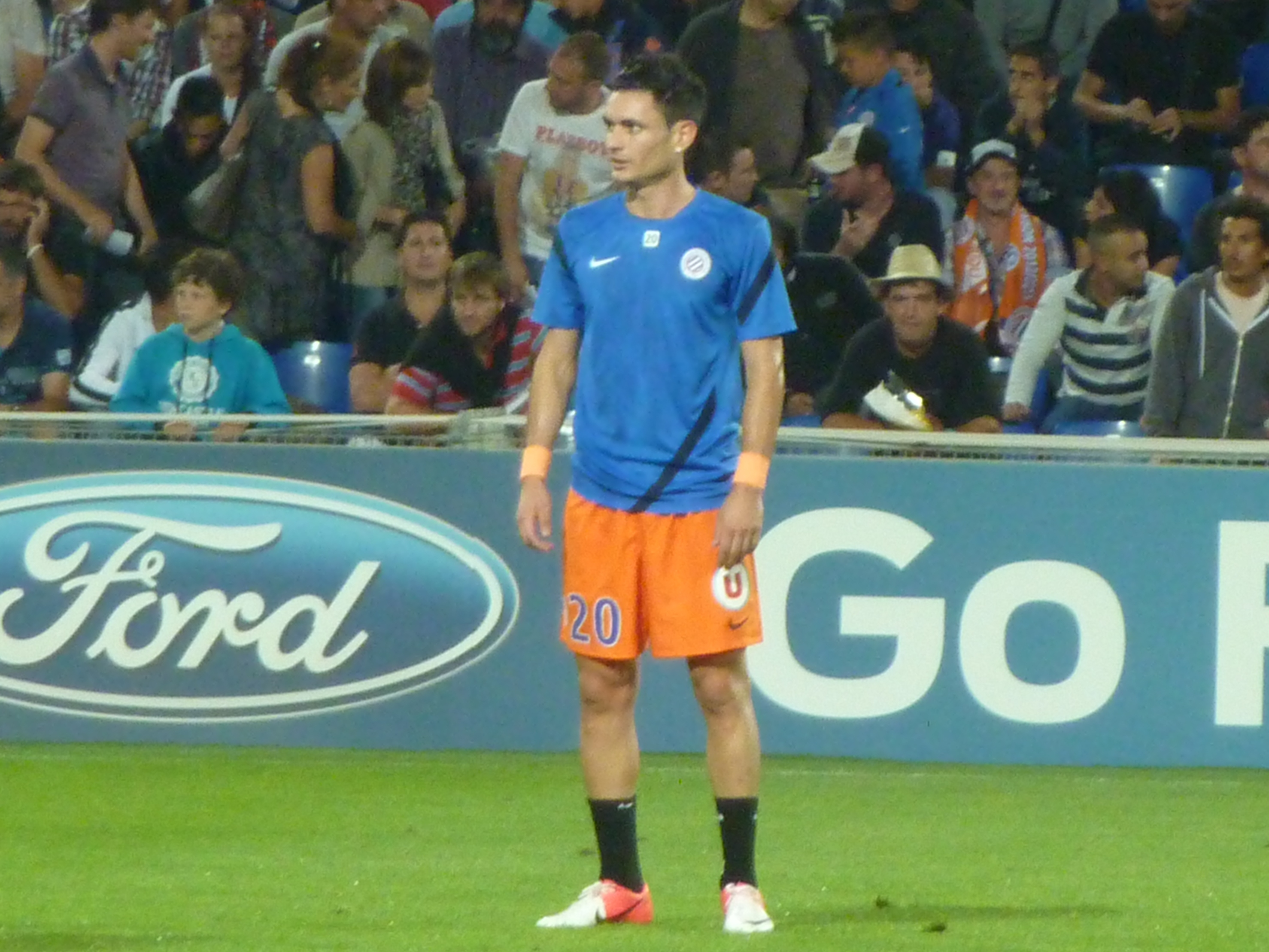 Rémy Cabella lors du match MHSC - Arsenal (Ligue des Champions, Phase de poules, 1er match, 18/09/2012)